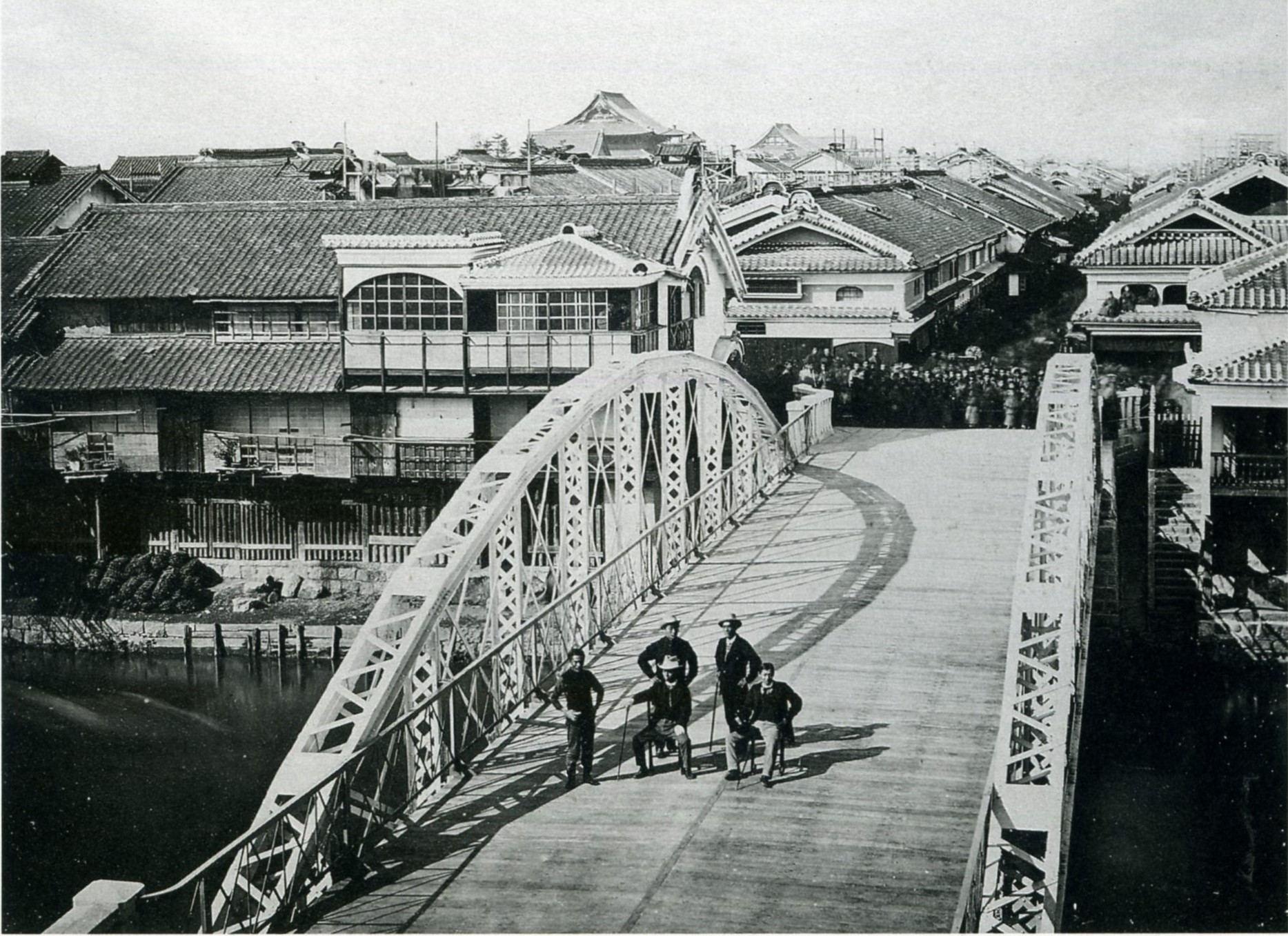 1873年(明治6年)、大阪で2番目、日本で5番目の鉄橋として架けられた心斎橋。1908年に撤去、1909年(明治42年)に石橋に架け替えられた。写真は北を見ている。橋の向こうに大勢の人がいる。鶏卵紙写真。現：大阪市中央区。 参考になるサイト